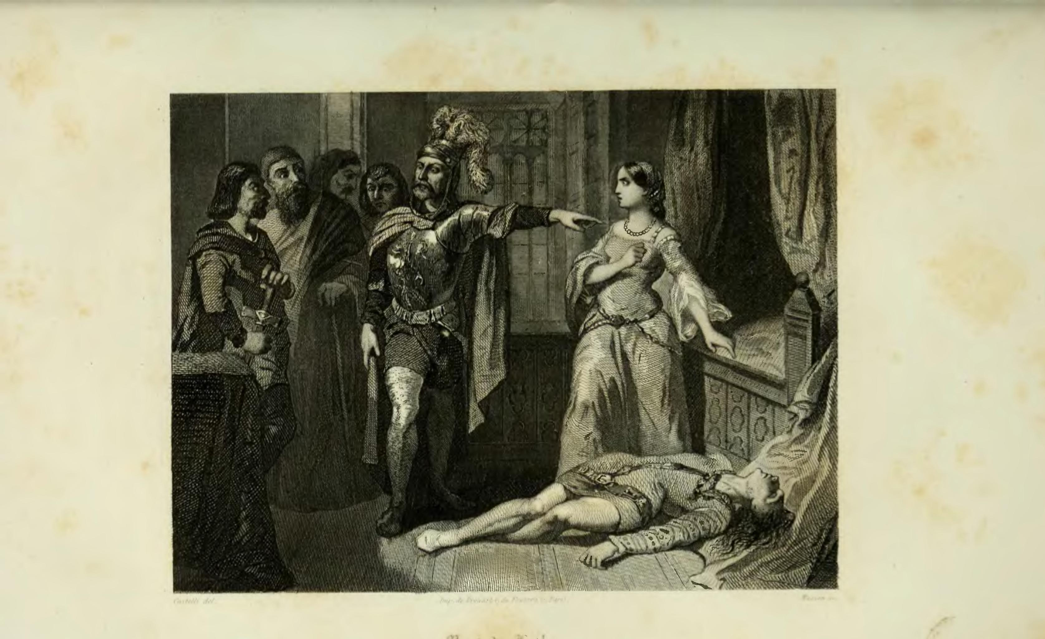 Illustration de livre